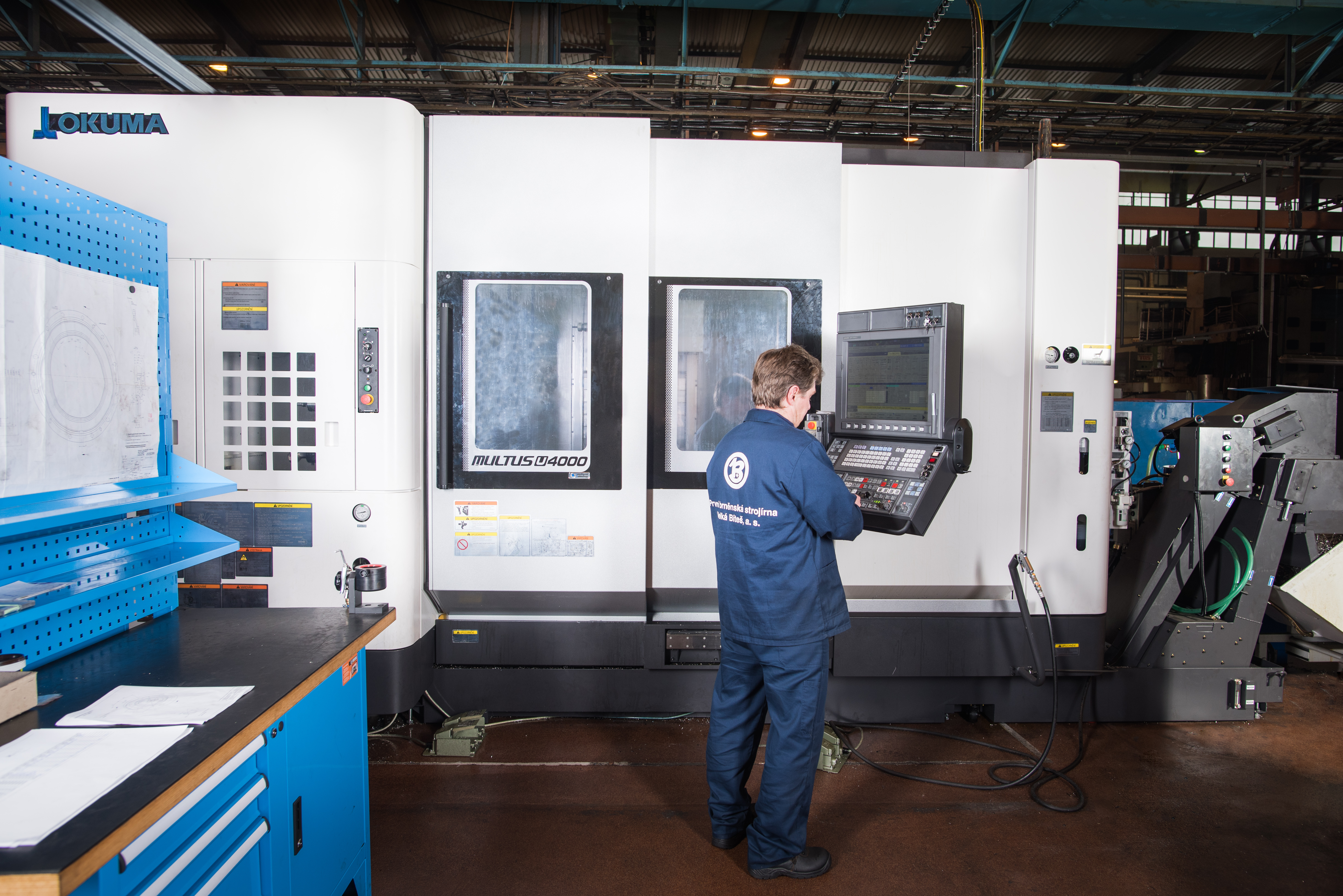 Soustružnicko-frézovací centrum Okuma Multus U4000 2SW-1500